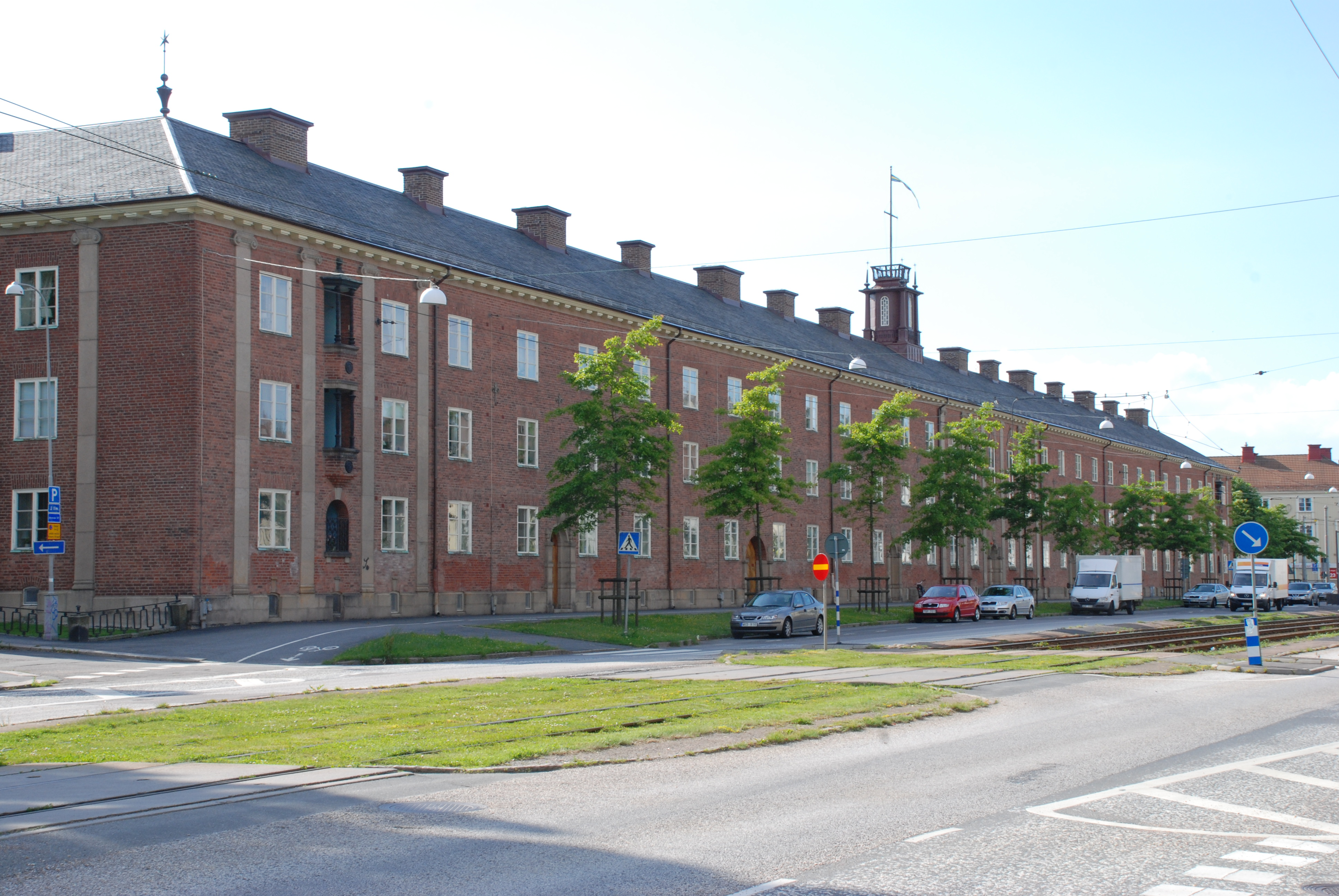 Broströmska stiftelsens hus vid Kungsladugårdsgatan i stadsdelen Kungsladugård i Göteborg. Uppförda 1925.